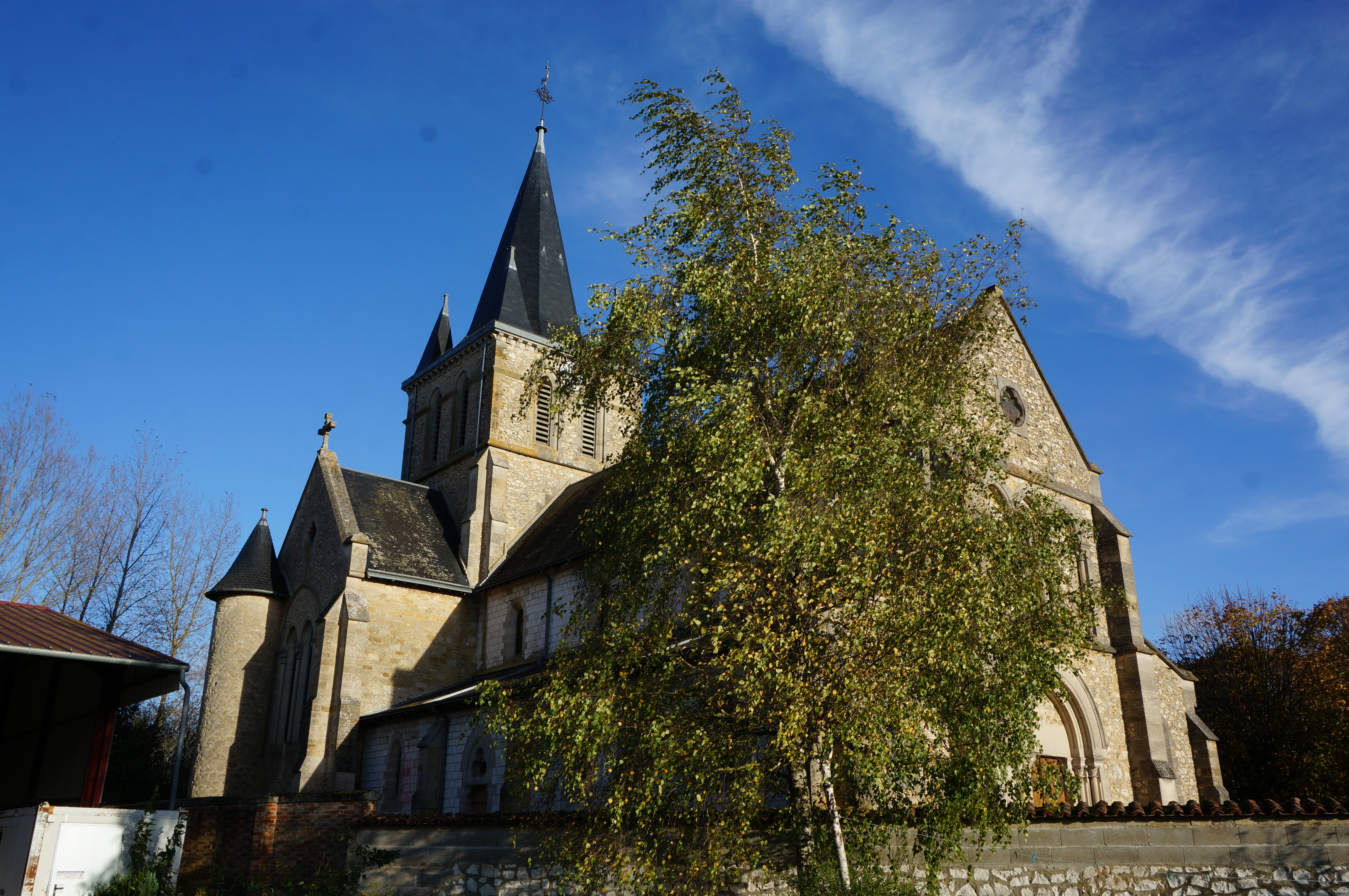 Vue de l'église.